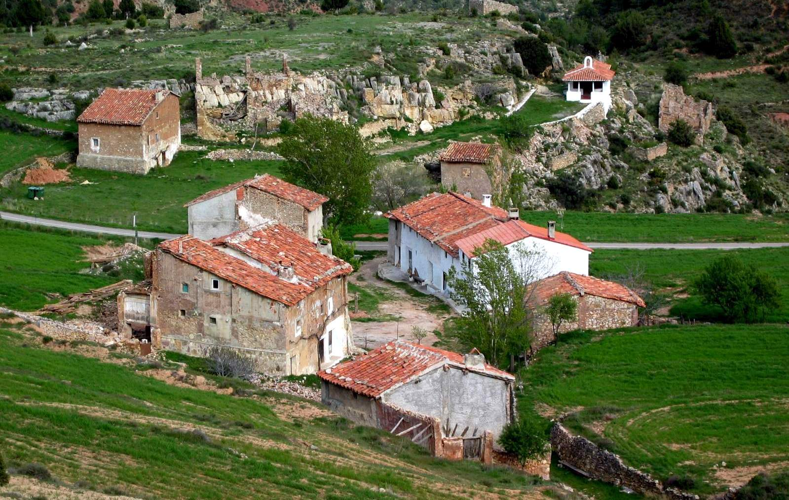 Vista general de Hoya de la Carrasca, Arcos de las Salinas (Teruel), con la Ermita de Santa Quiteria al fondo, año 2006.